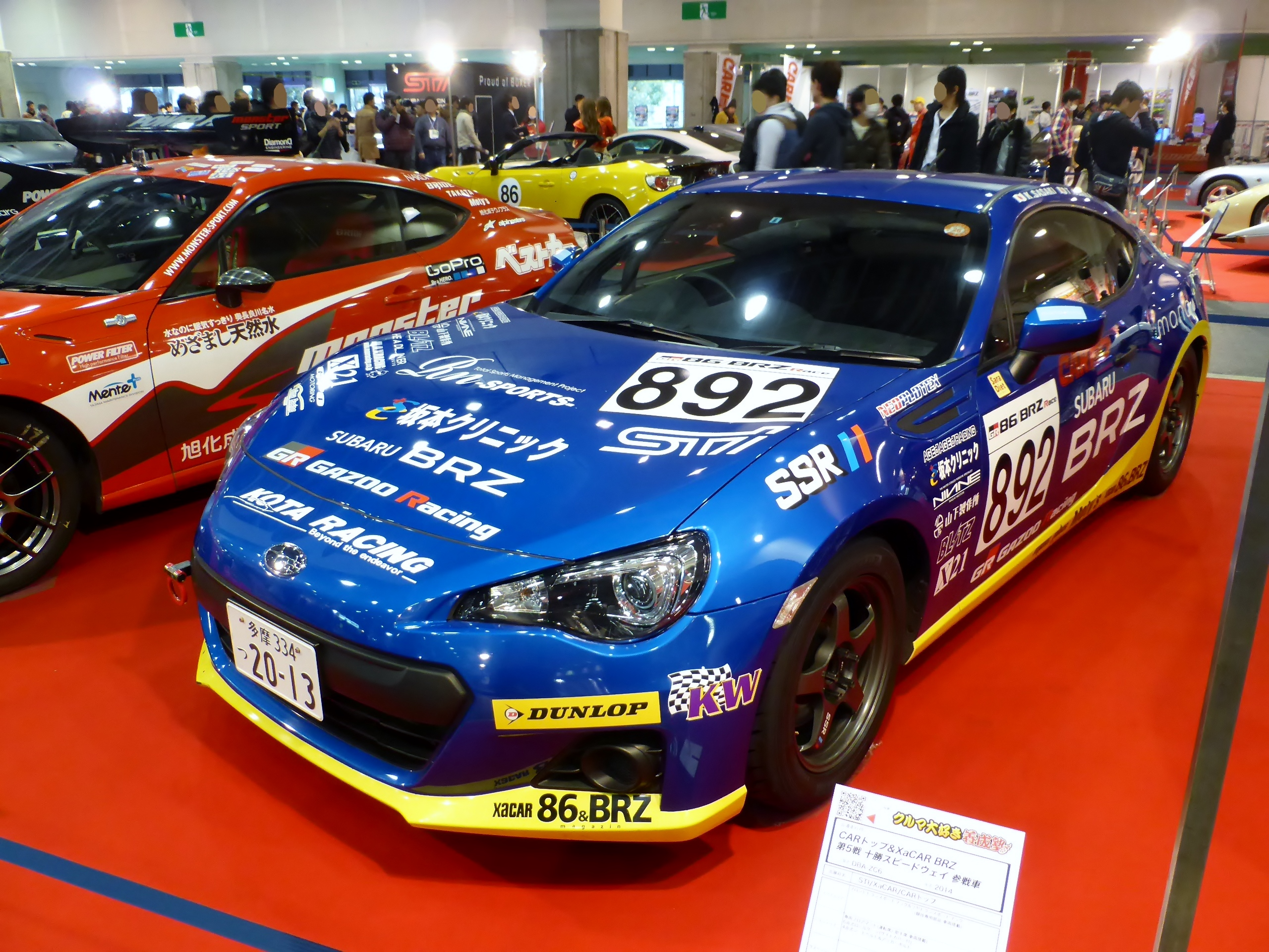 大阪オートメッセ2014においてGAZOO Racing 86/BRZレース第5戦十勝スピードウェイに参戦した892号車CARトップ&XaCAR BRZを撮影。